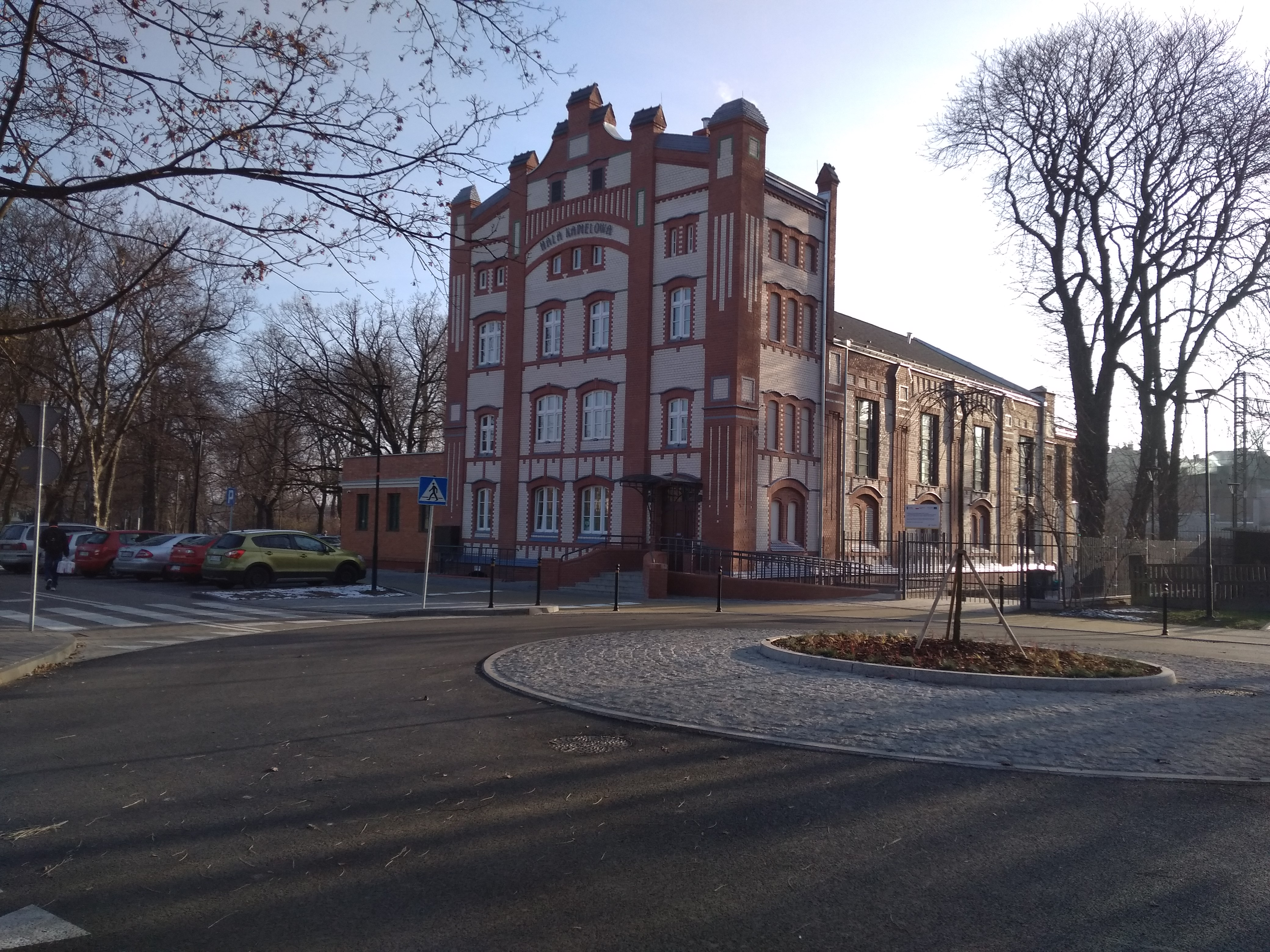 Budynek Pływalni Miejskiej w Siemianowicach Śląskich, wybudowany w 1908 roku